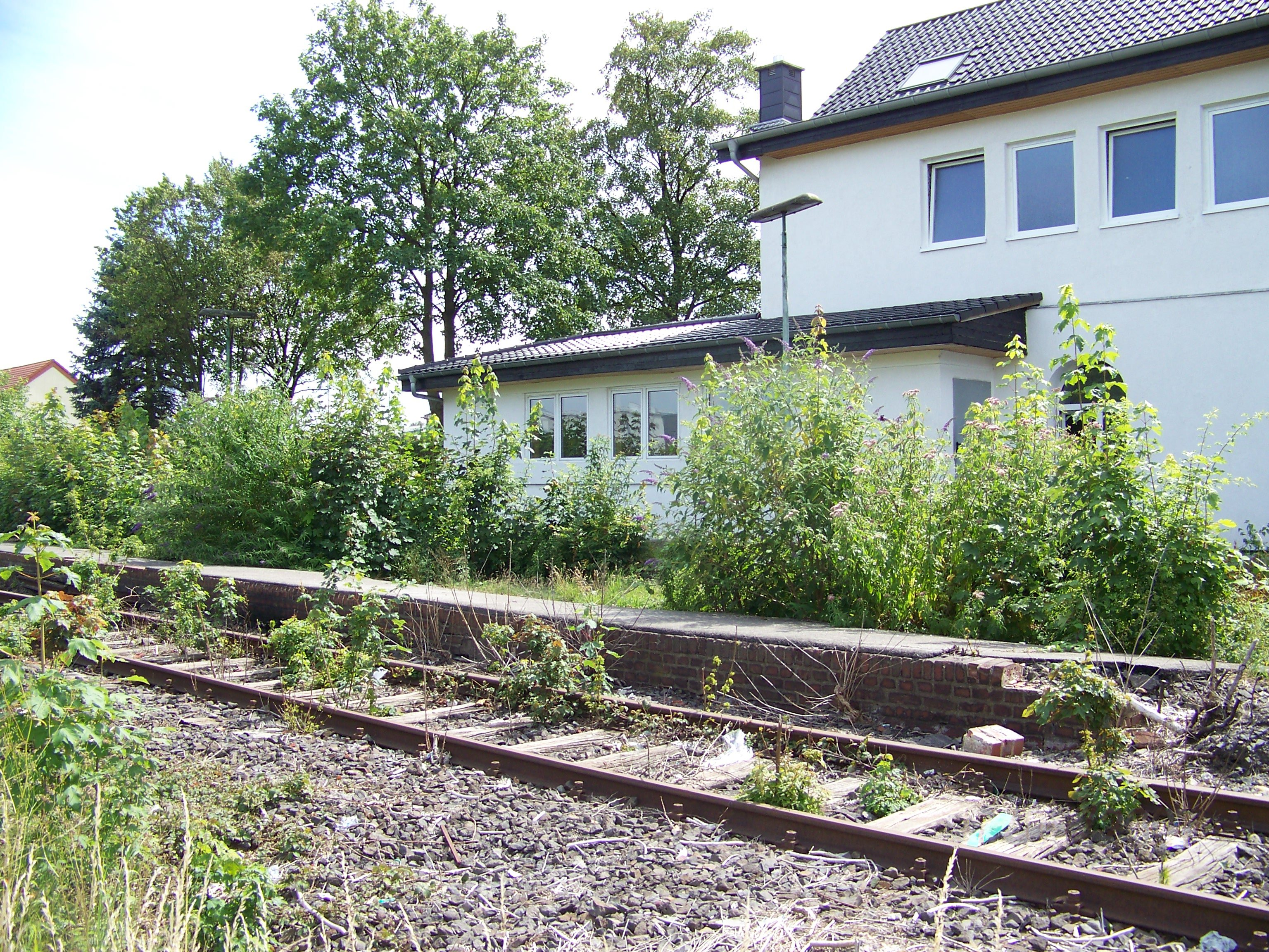 Foto vom ehemaligen Bahnhof Mariadorf auf der Ringbahn Herzogenrath–Alsdorf–Stolberg bei Streckenkilometer 10,2